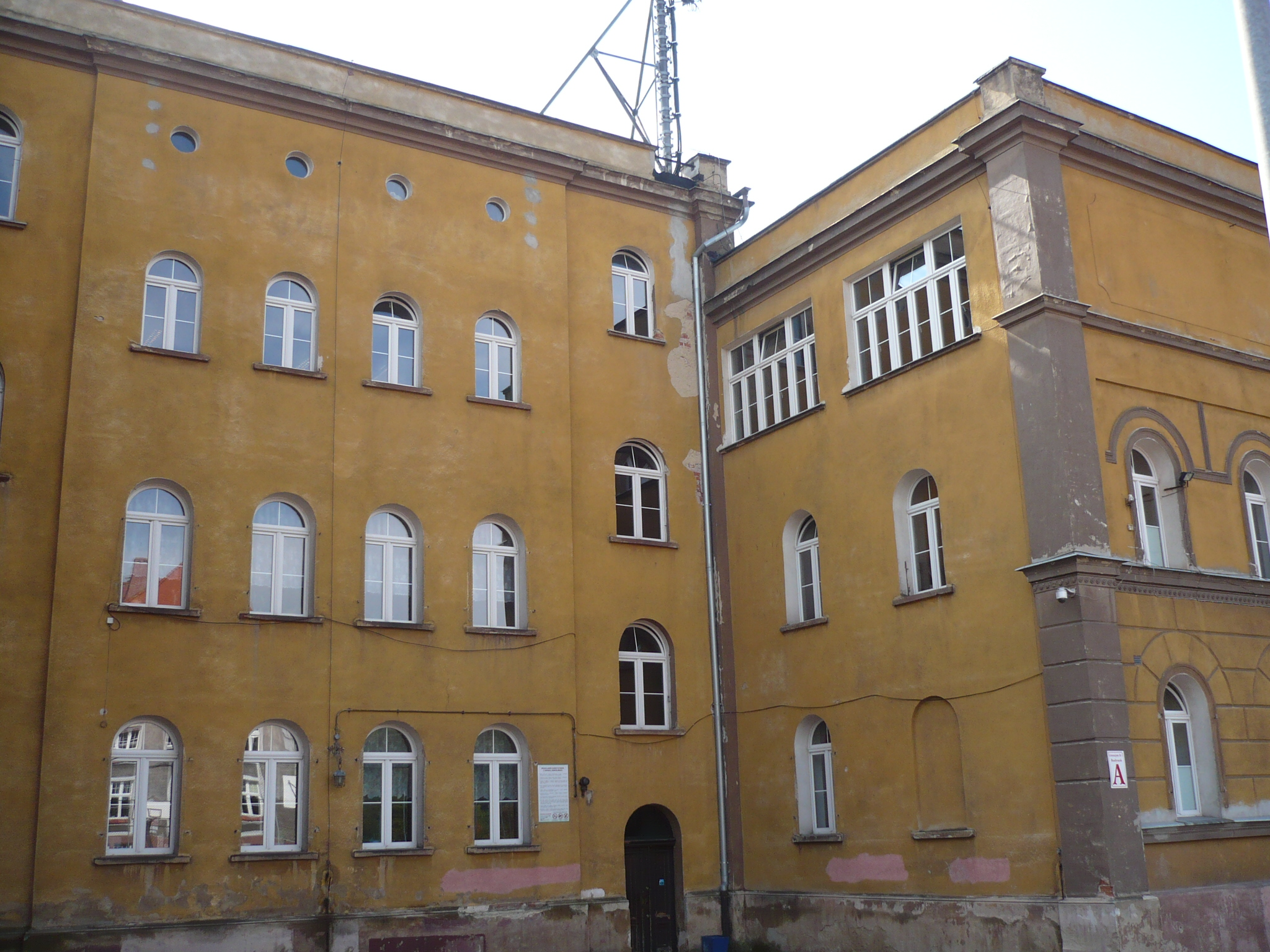 Nowa Ruda. Gimnazjum Nr 1